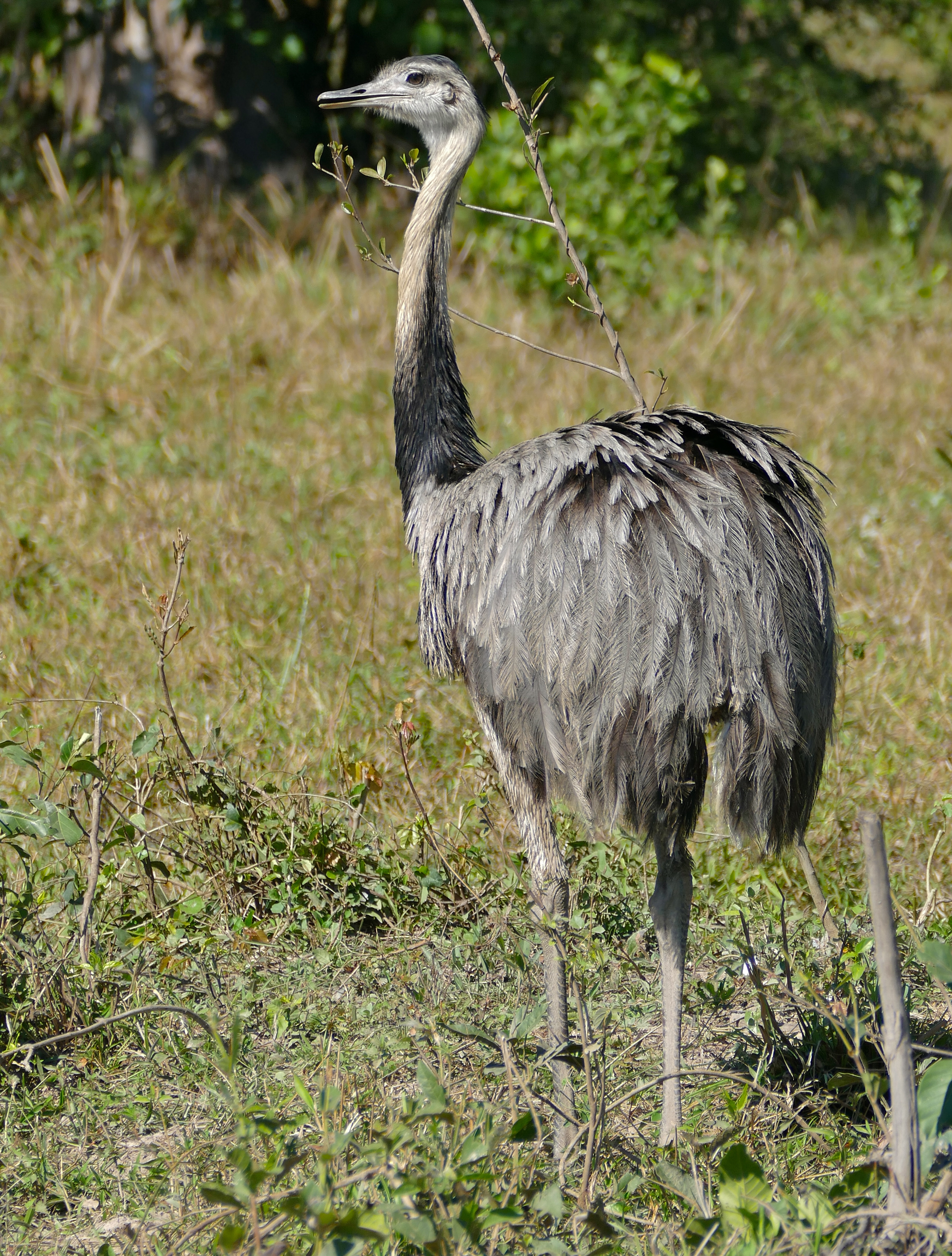 Transpantaneira, Poconé, Mato Grosso, BRAZIL